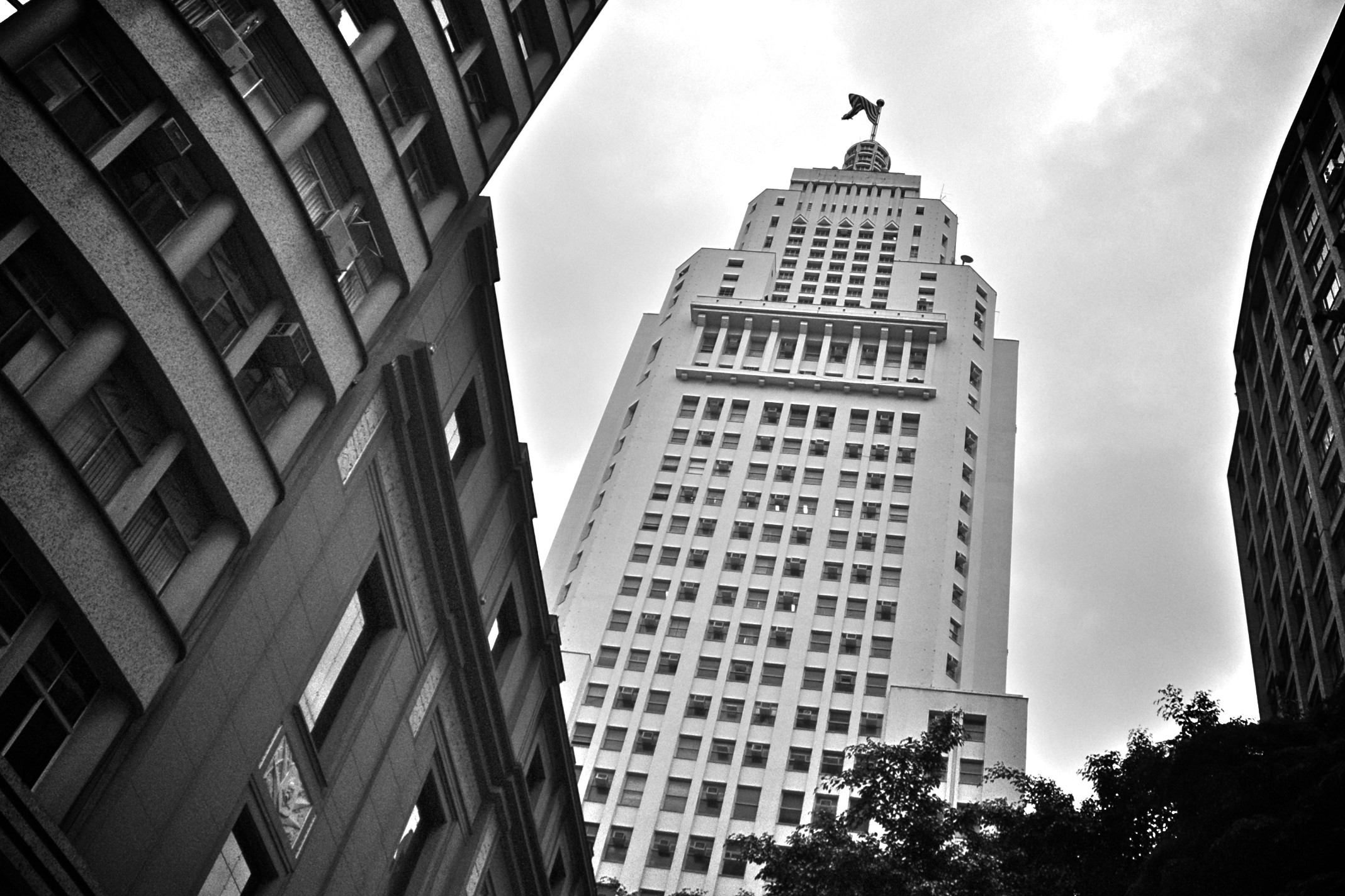 Banespa build, S.Paulo, SP, Brazil